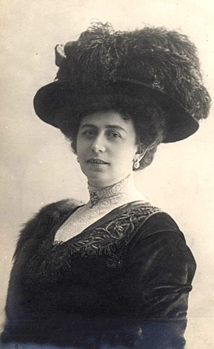 Antonina Nezhdanova